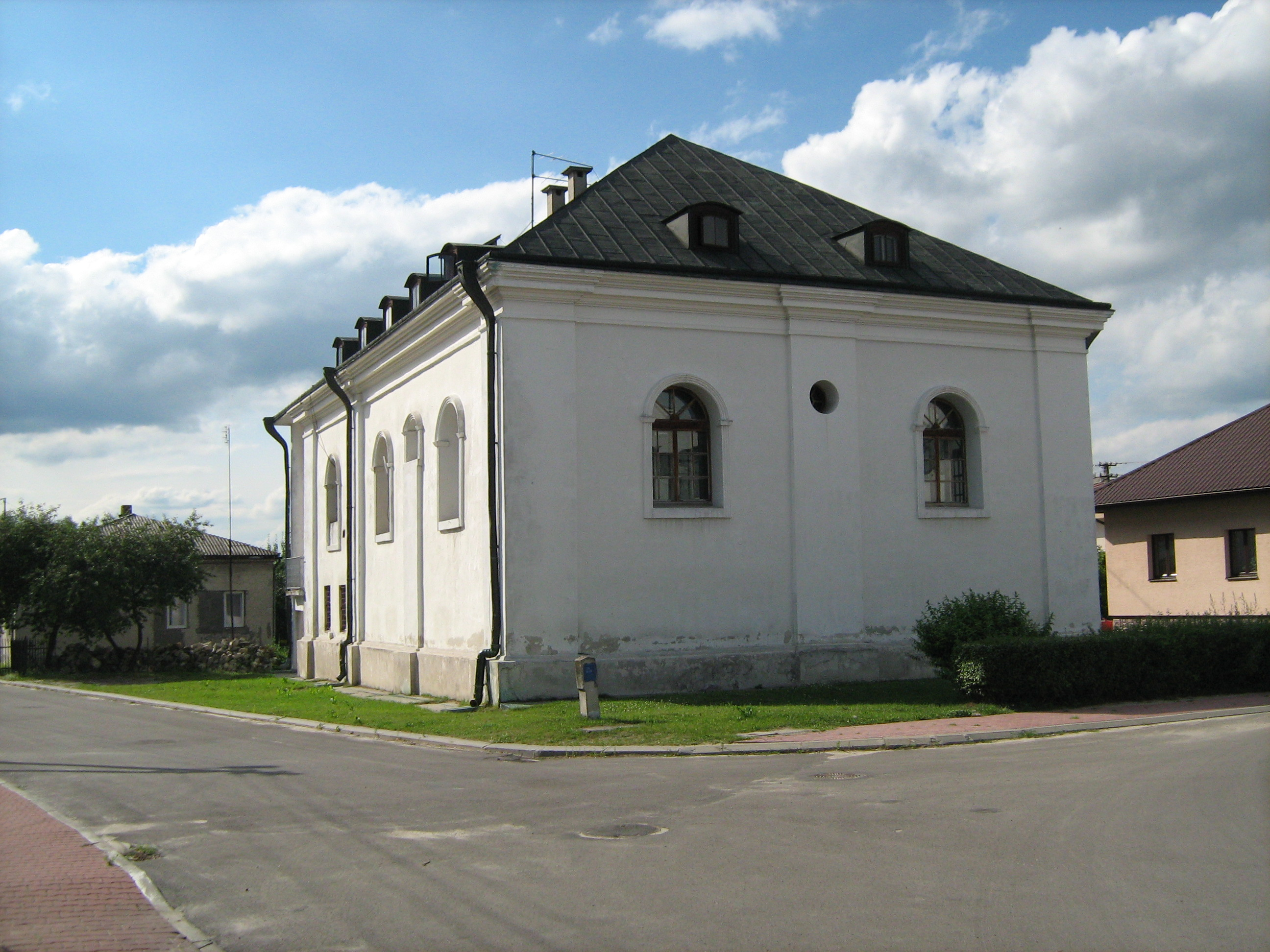 Synagoga w Józefowie (powiat Biłgoraj).